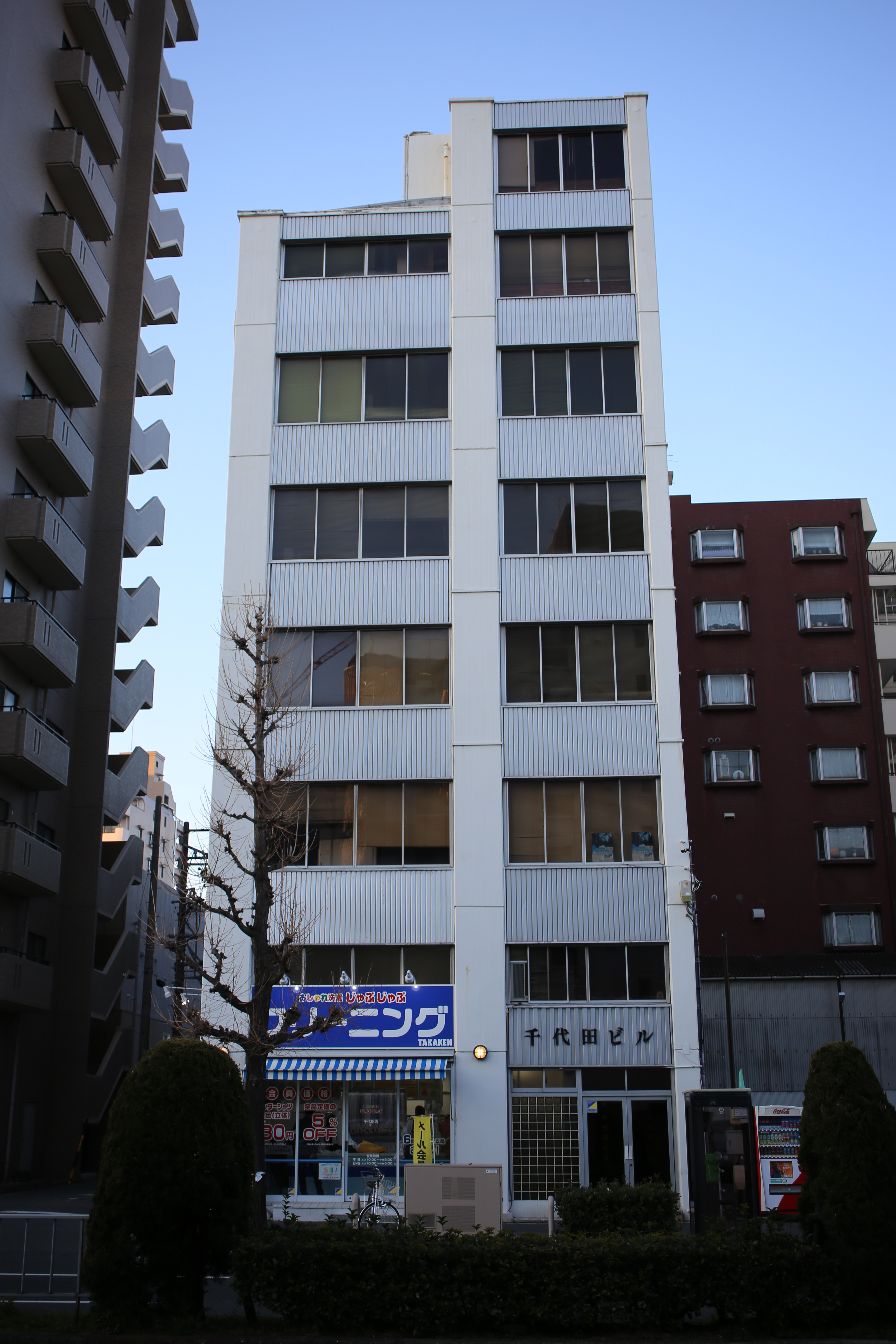 名古屋市中区千代田二丁目の千代田ビル